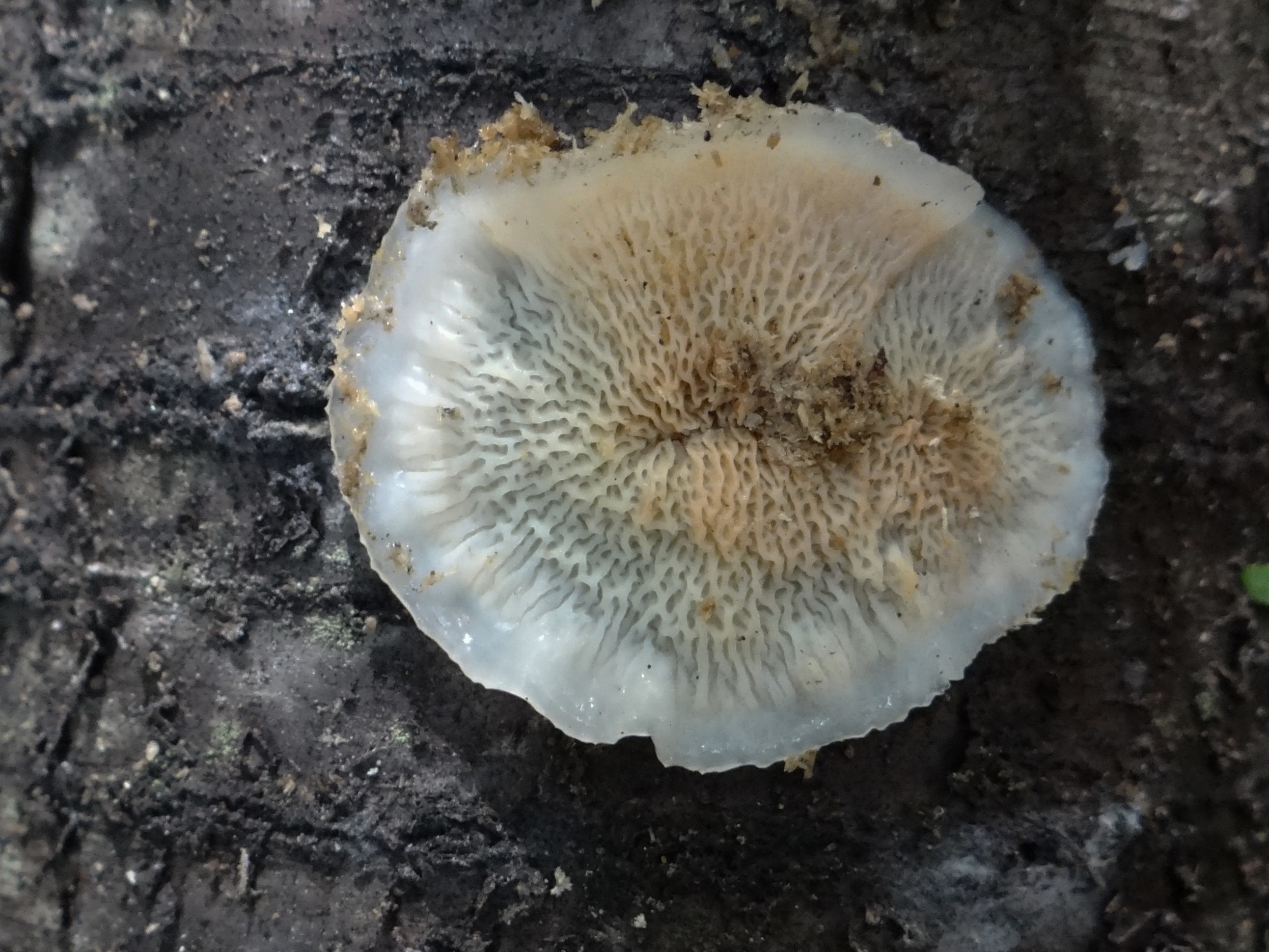 Merulius tremellosus